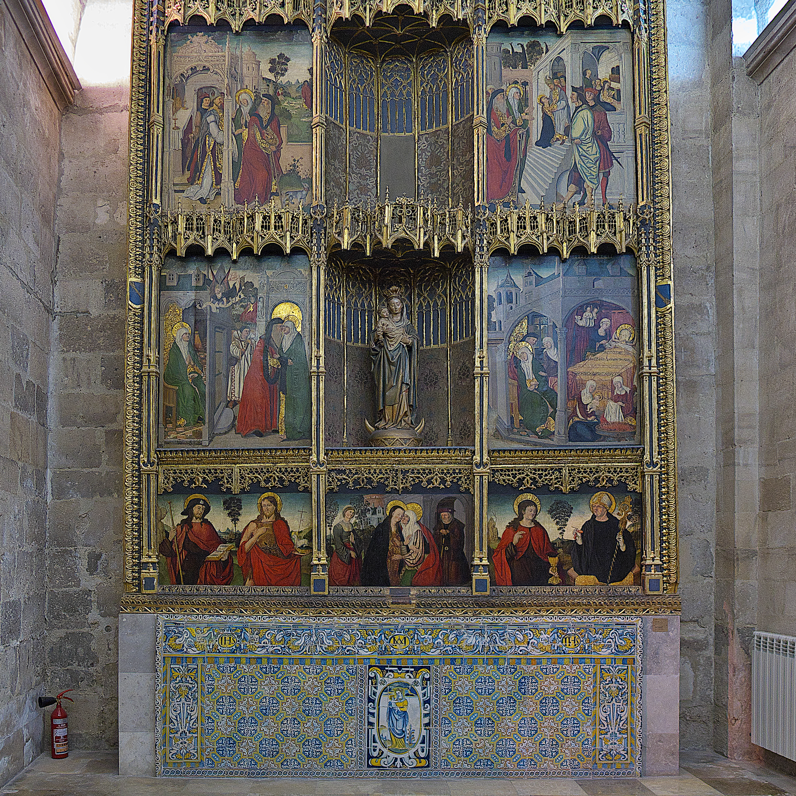 Retablo de Santa Ana (s. XV). Procedente de la Iglesia de Santa María la Antigua. El Maestro de Gamonal desarrolla la temática histórica de Santa Ana, pinturas sobre tablas. El frontal, (antependium), obra de azulejería del siglo XVI.